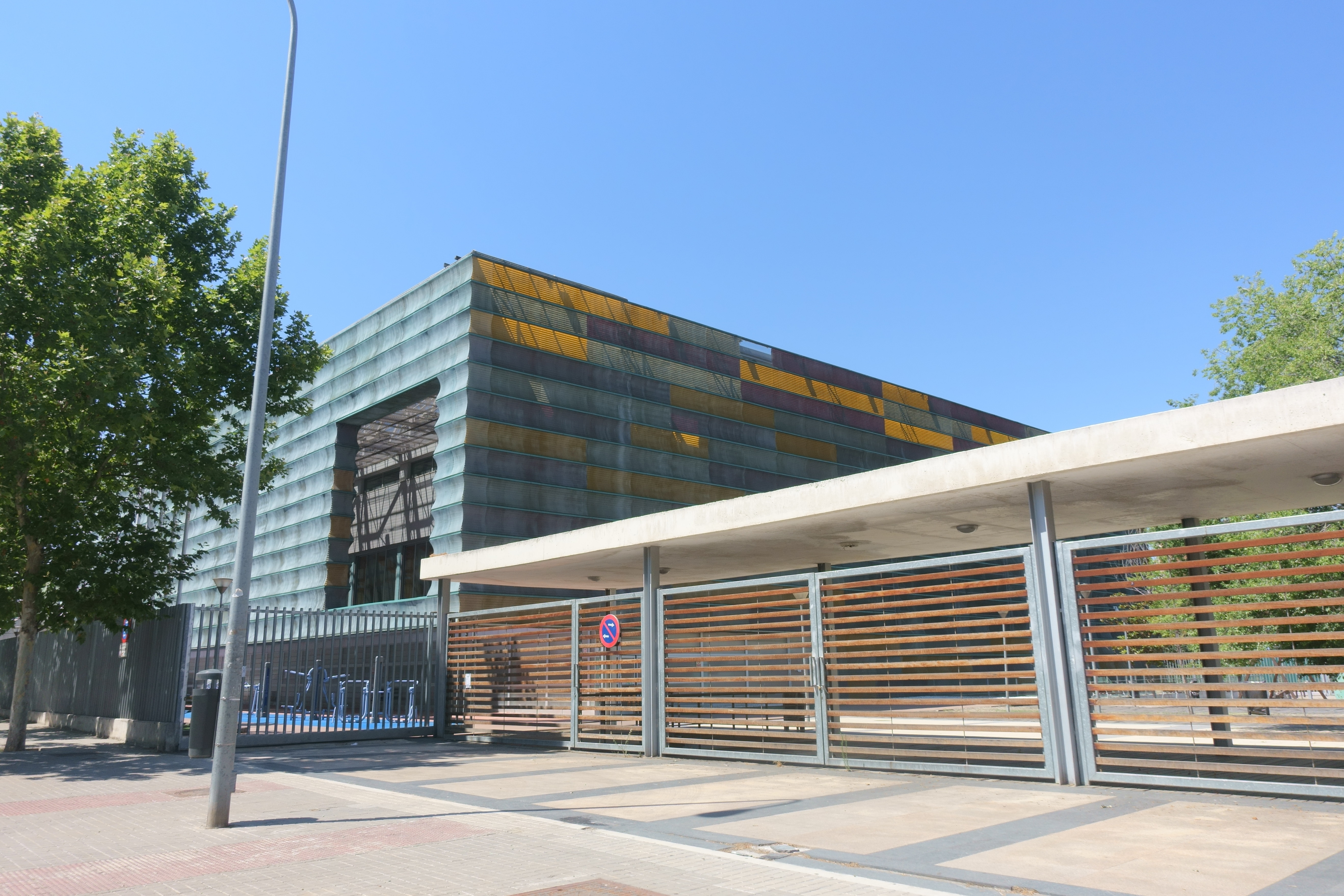 Ciudad Deportiva Las Olivas, en Aranjuez (Madrid, España).